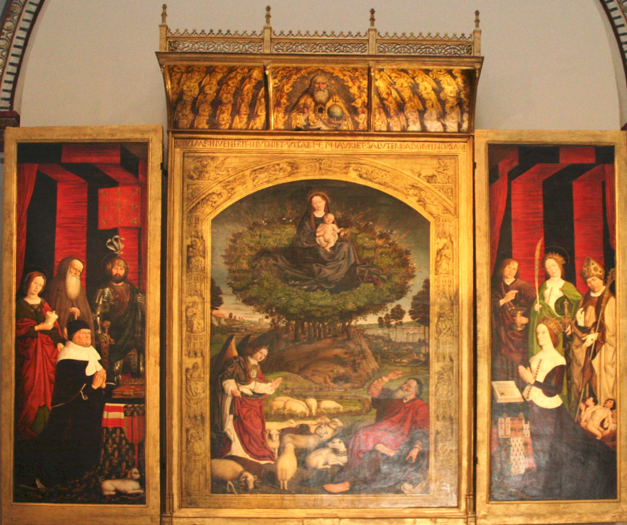 Cathédrale Saint-Sauveur d'Aix-en-Provence. Triptyque du buisson ardent ouvert.